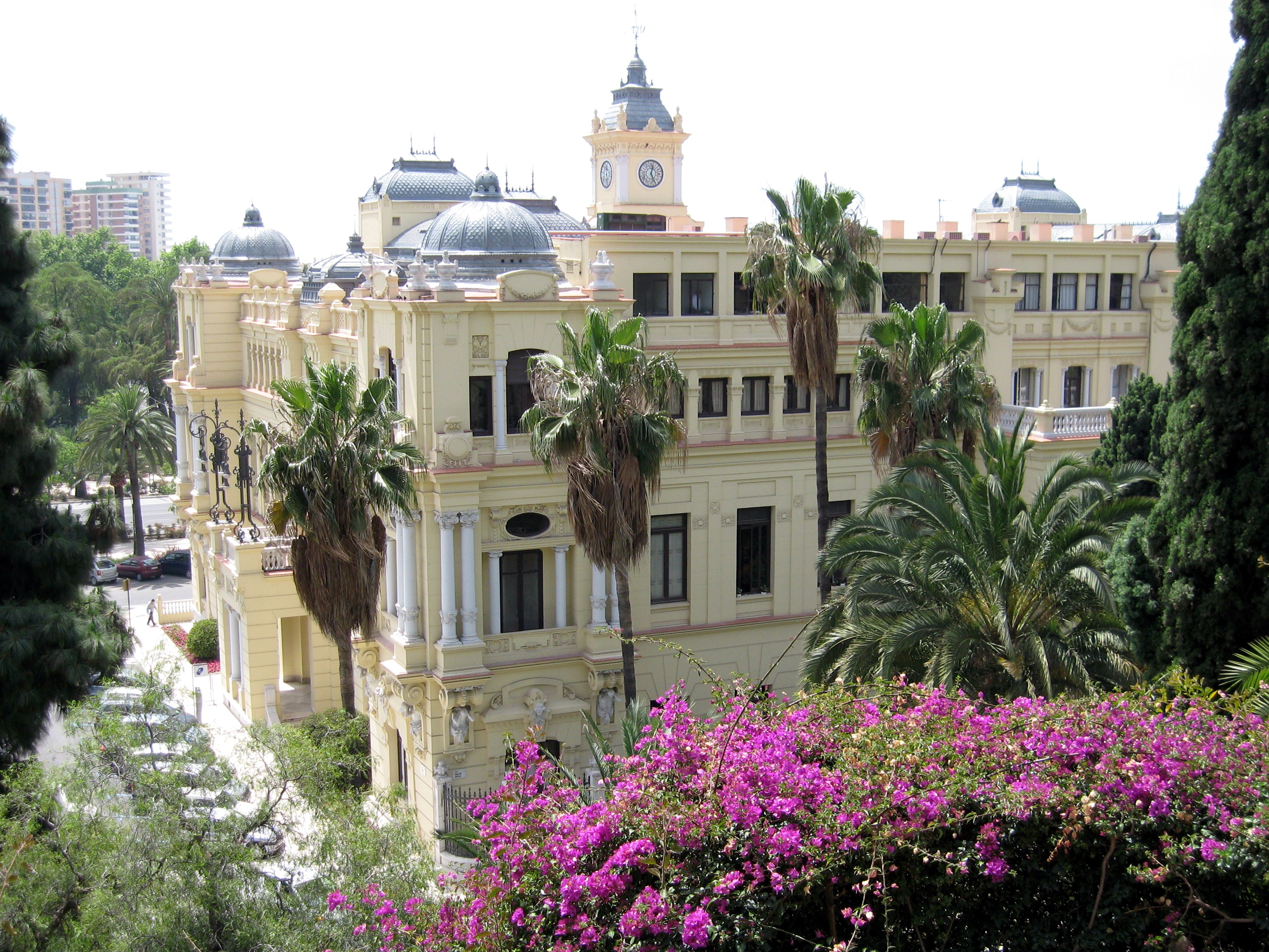 Rathaus von Málaga (Ayuntamiento de Málaga), Andalusien, Spanien